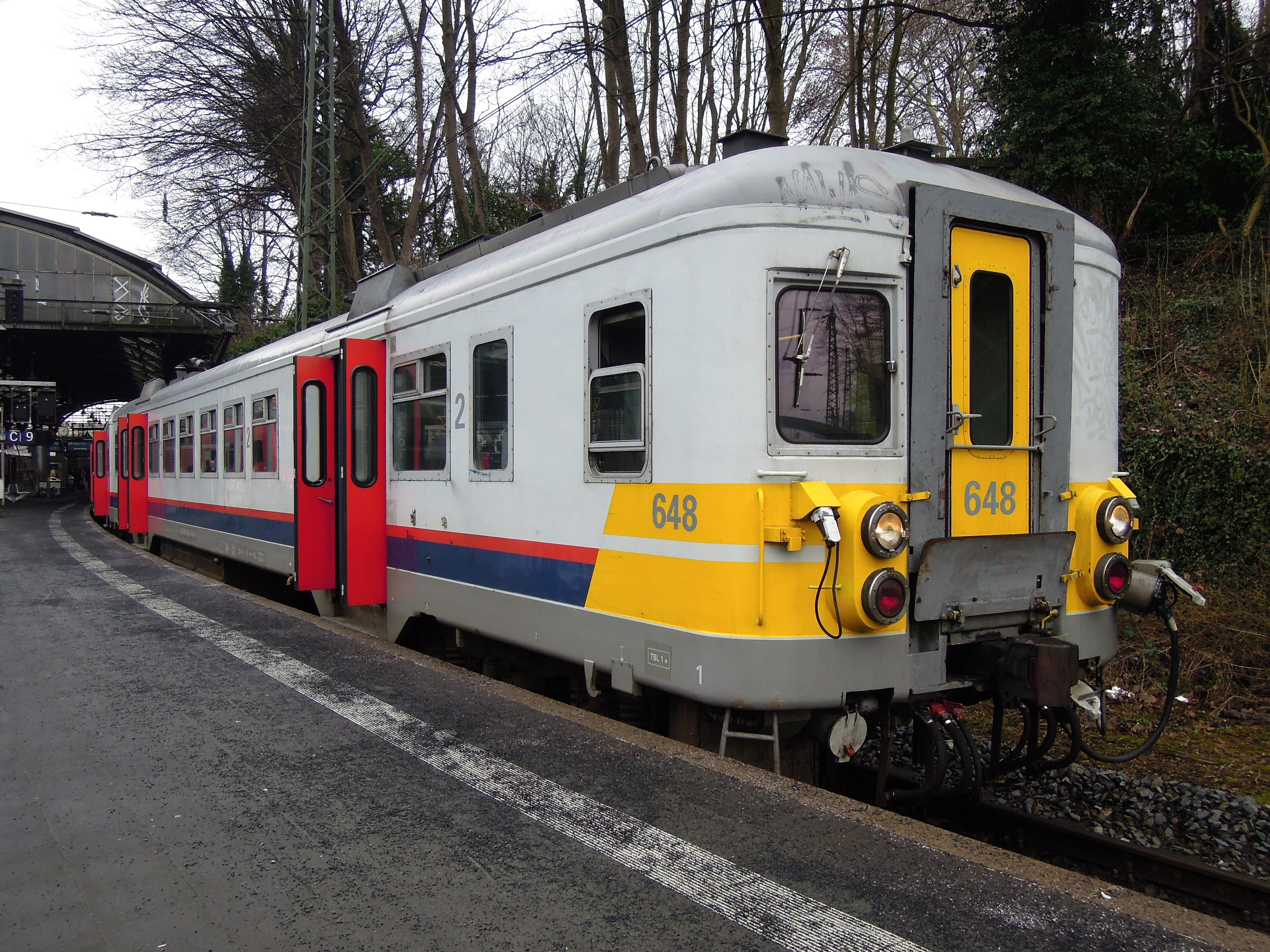 SNCB-Triebzug 648 wartet im Aachener Hauptbahnhof auf Ausfahrt in Richtung Spa-Geronstère.